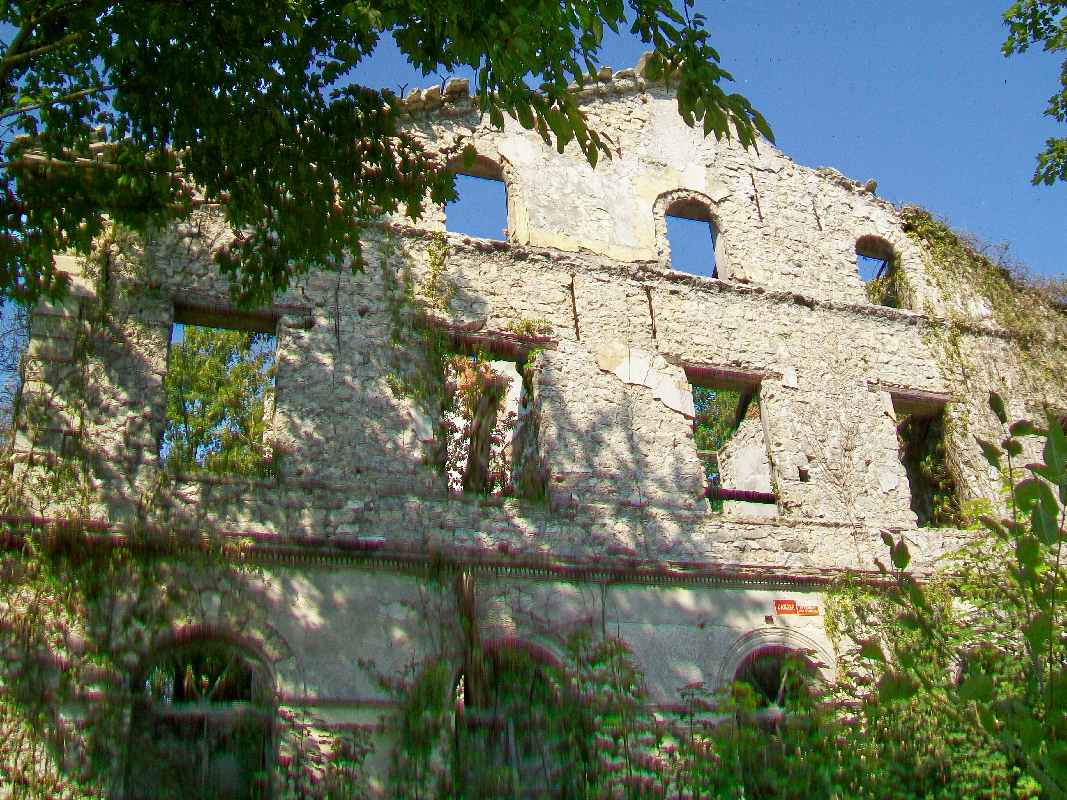 Détail de la façade sud.